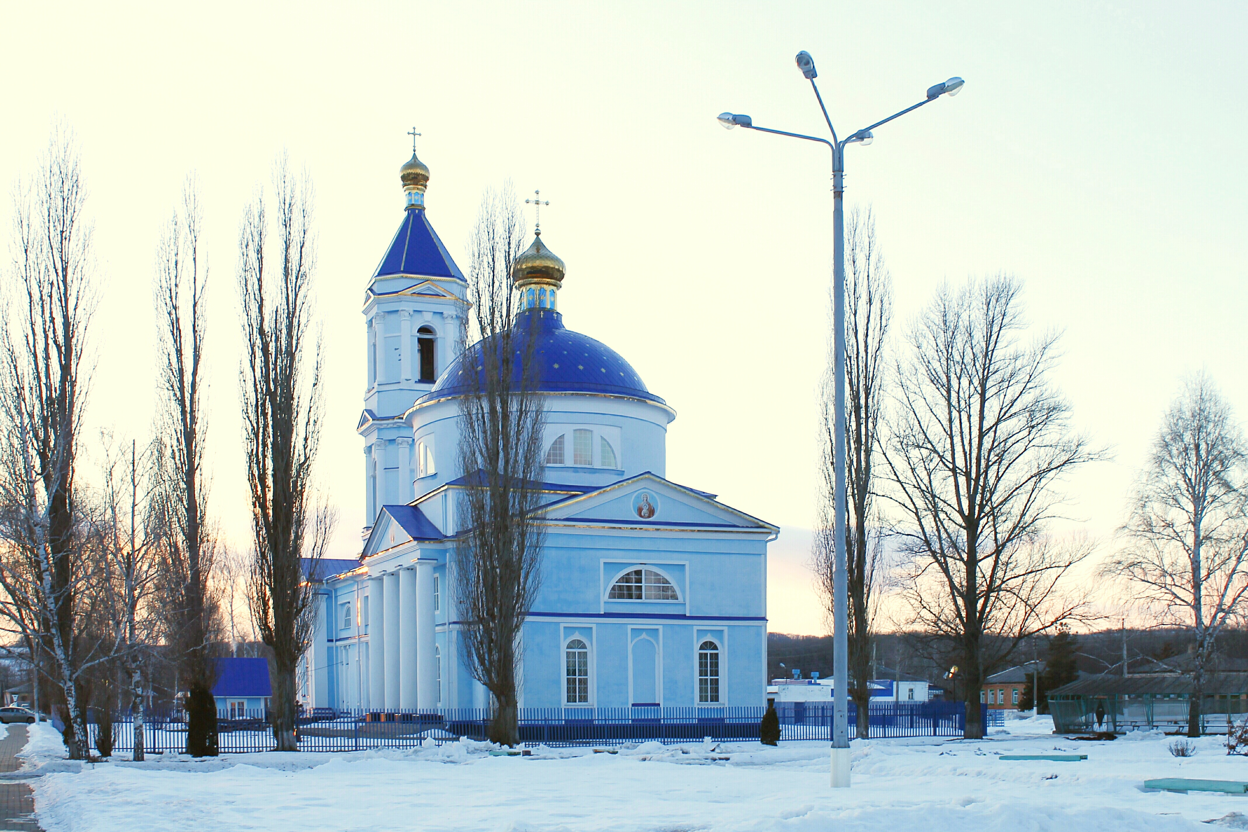 храм иконы Божией Матери «Знамение»